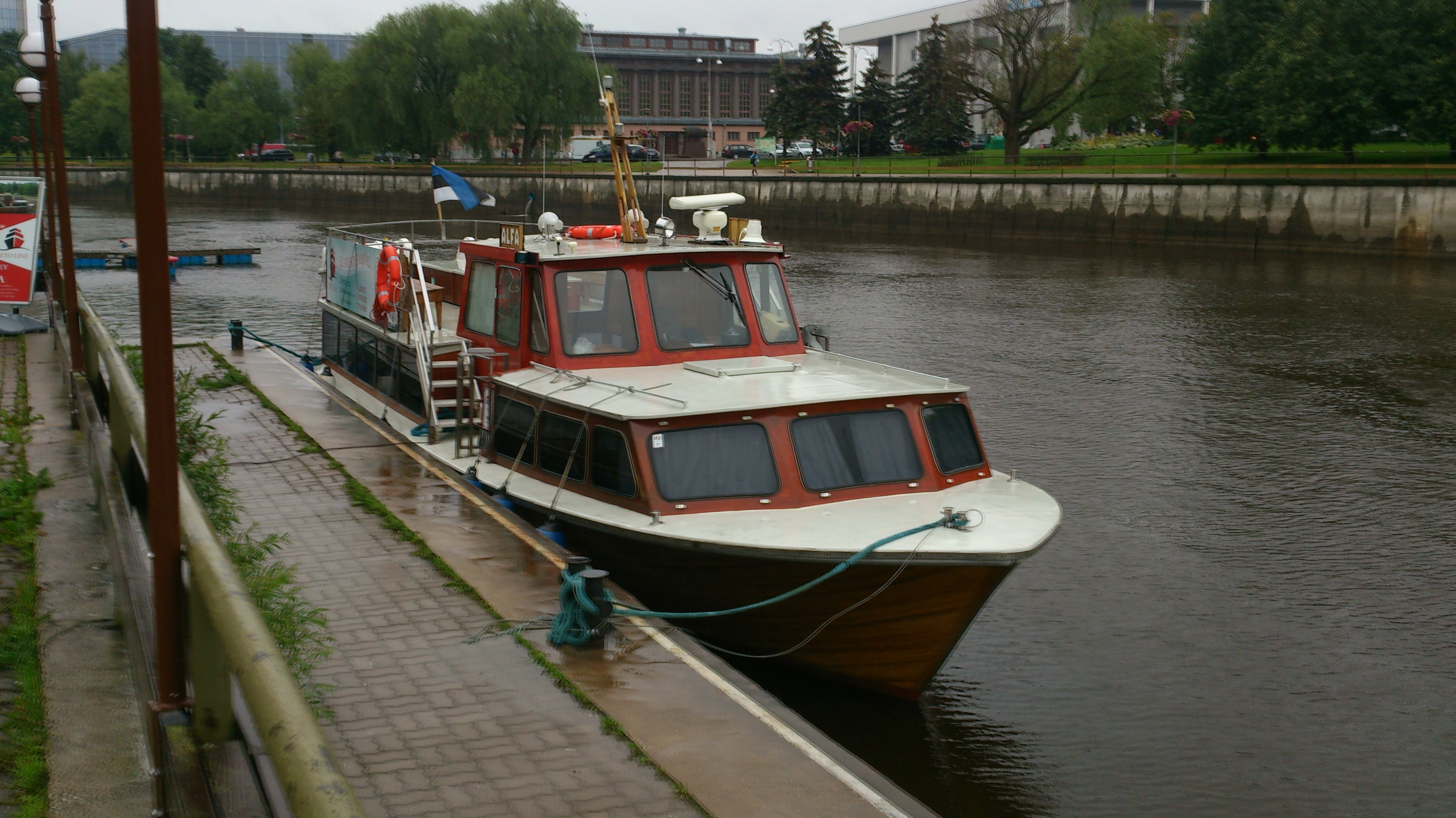 Jõelaev Alfa Emajõel Atlantise kai ääres, 29. juuni 2014